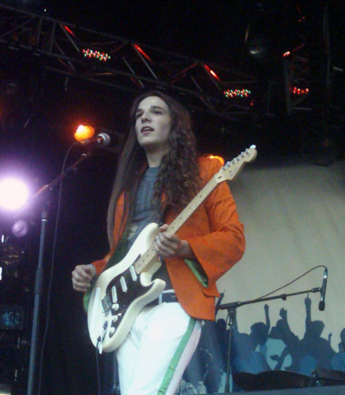 Pascal Chaumont en spectacle aux FrancoFolies de Montréal